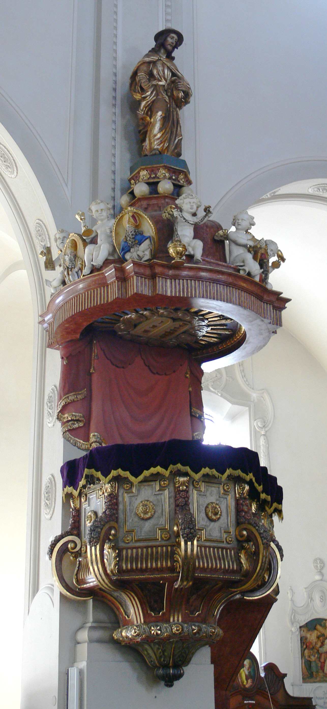 Lindenberg im Allgäu, Katholische Stadtpfarrkirche St. Petrus und Paulus Kanzel (neobarock)